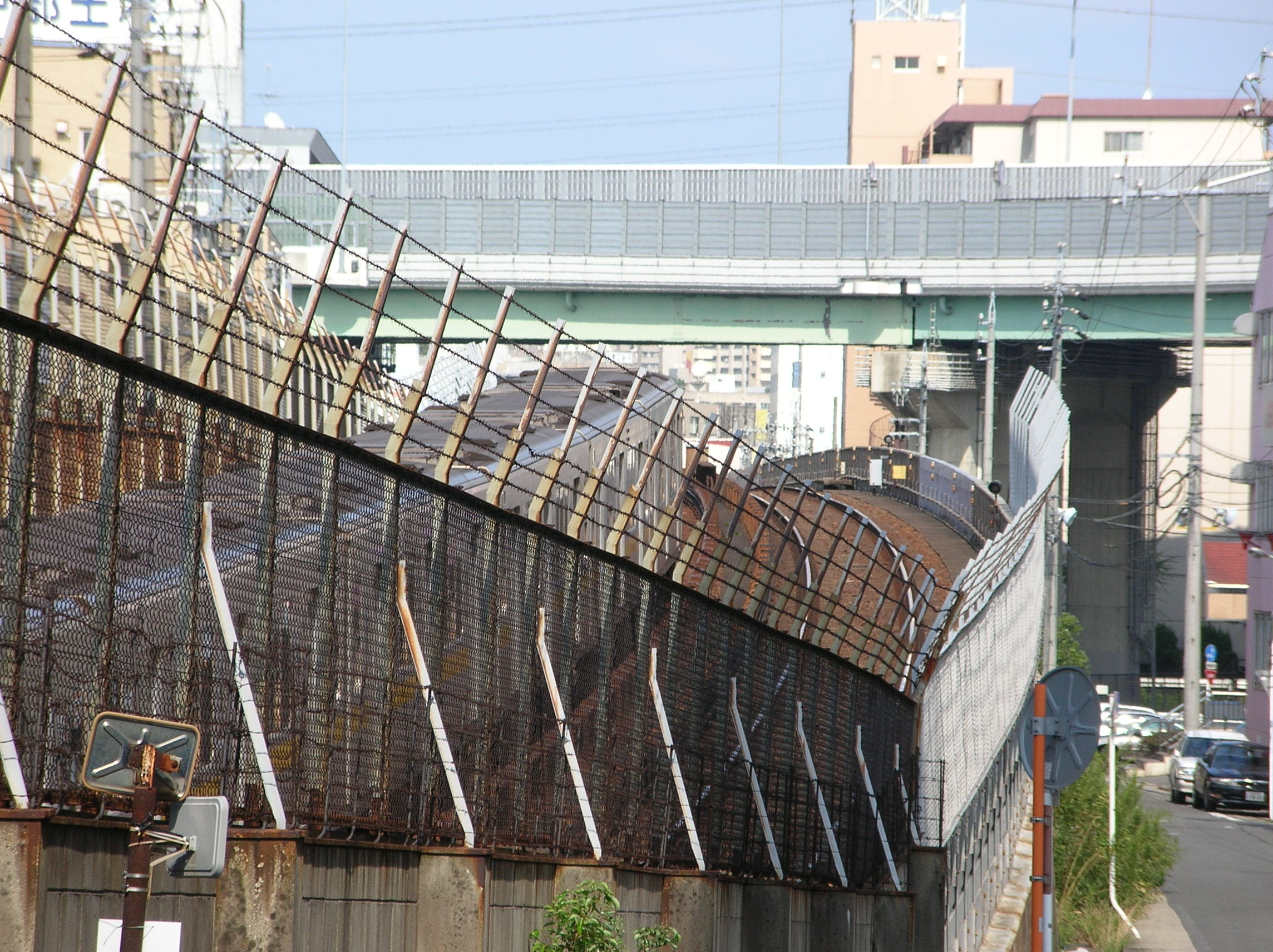 名古屋市営地下鉄東山線一社駅 - 上社駅間